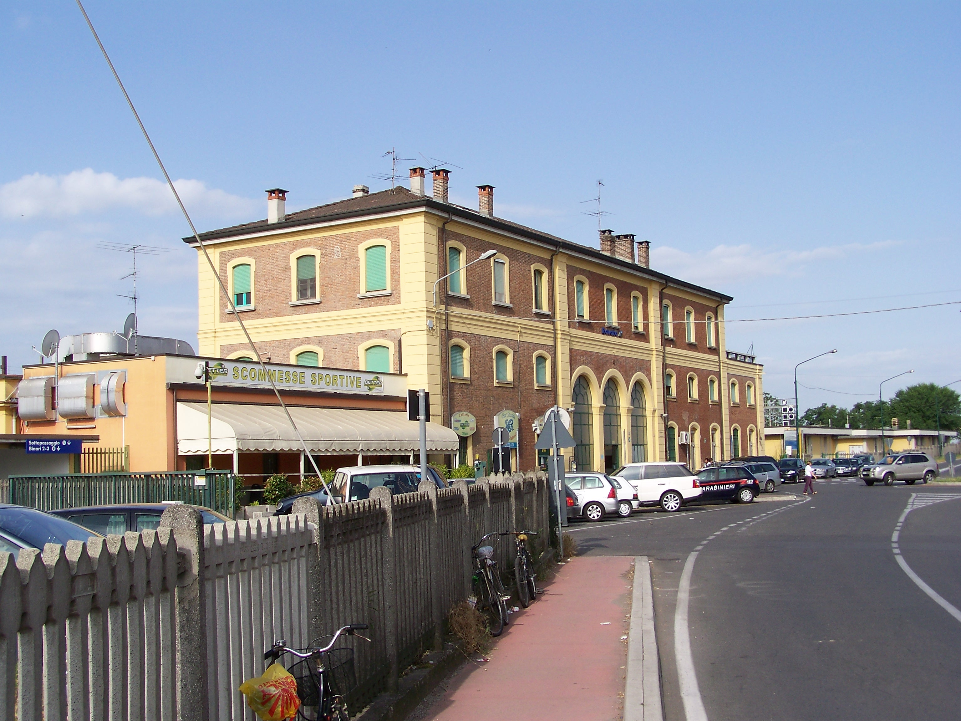 Lato campagna della stazione di Rovato.